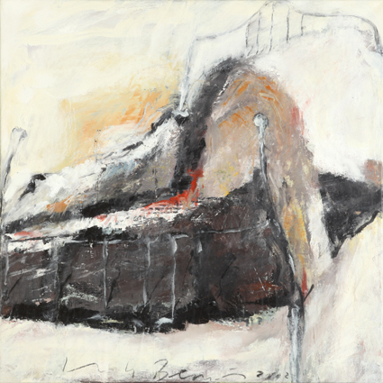 Malerei mit dem Titel "Bettenschlacht 1" des Künstlers Lutz Bernsau